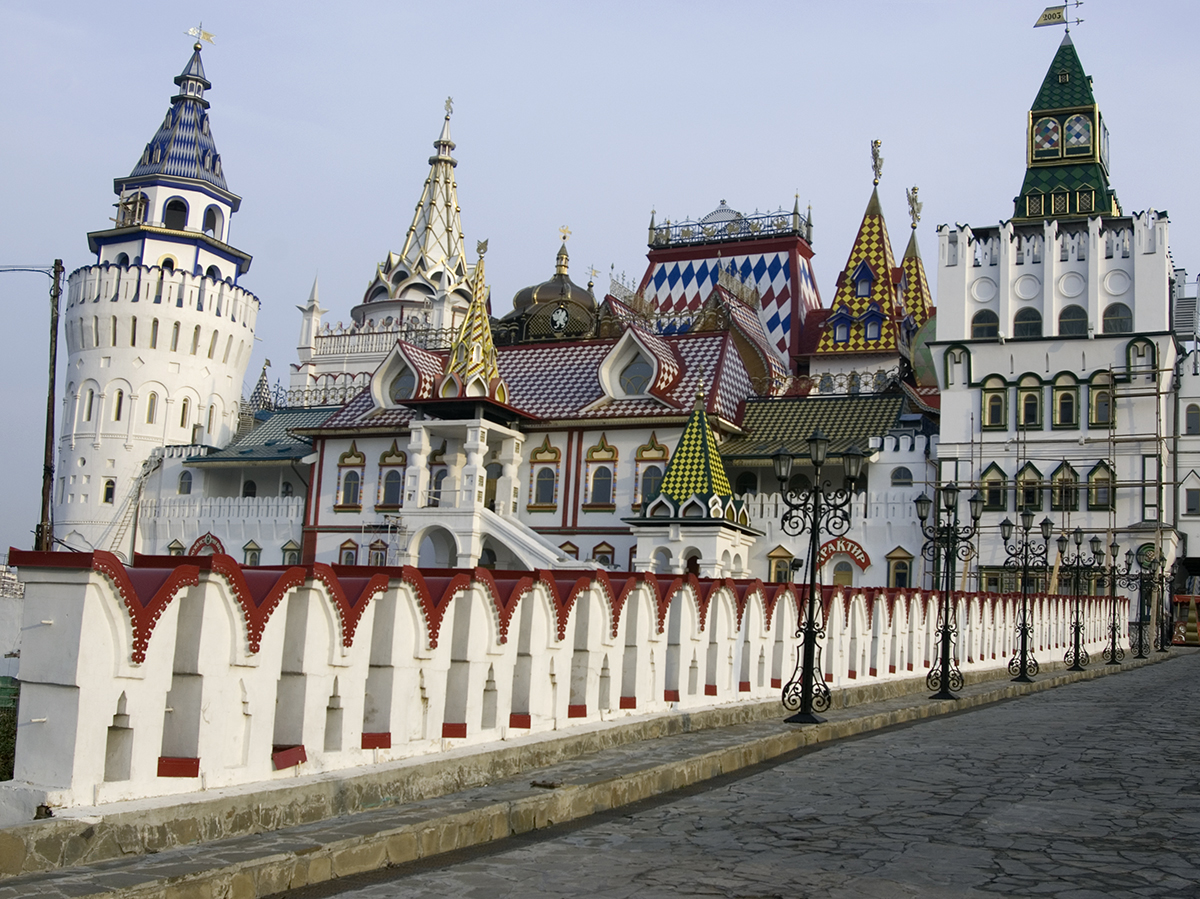 Izmaylovo